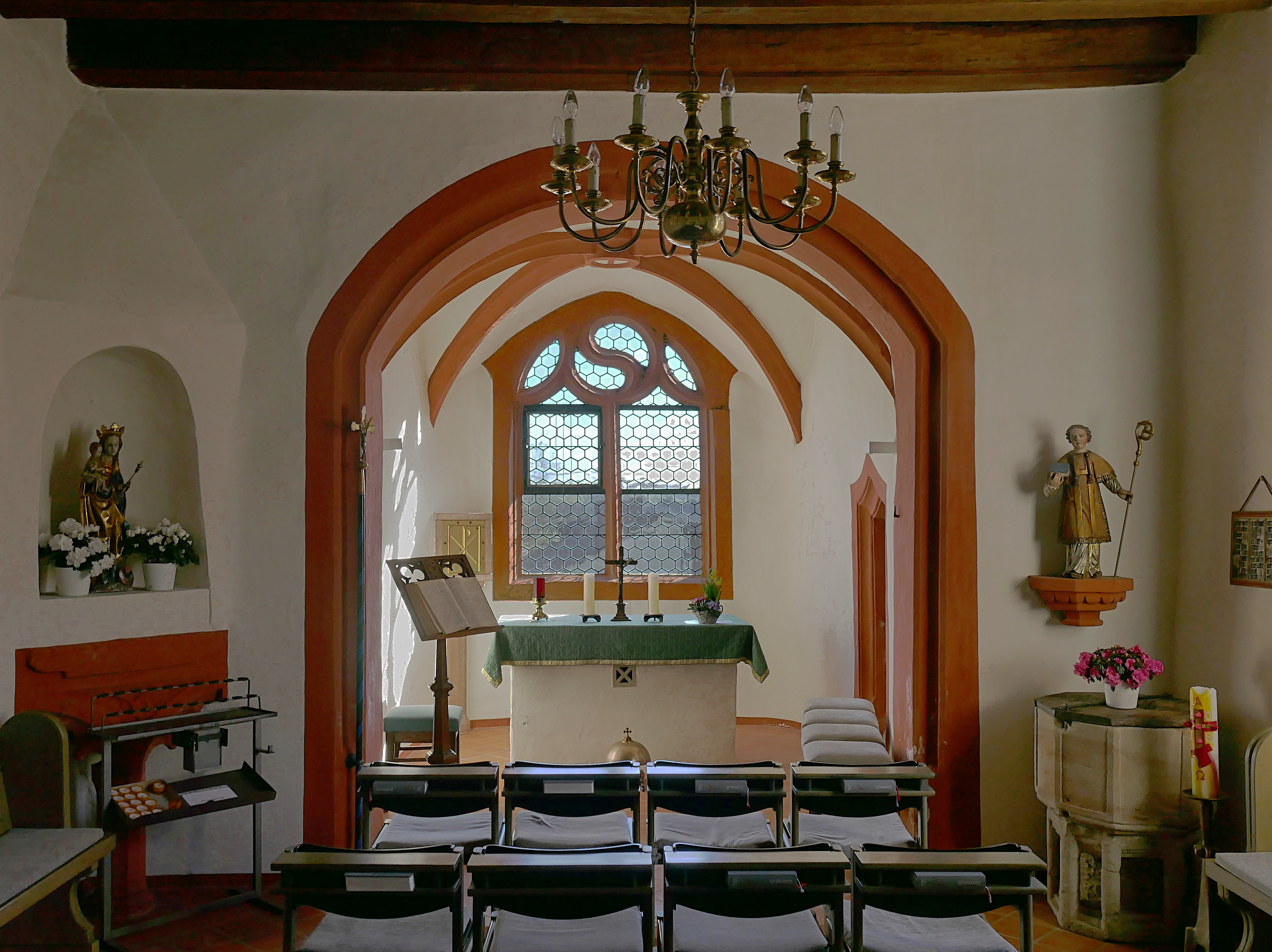 Kirche St. Abriuculus in Besslich (Rheinland-Pfalz, Kreis Trier-Saarburg)